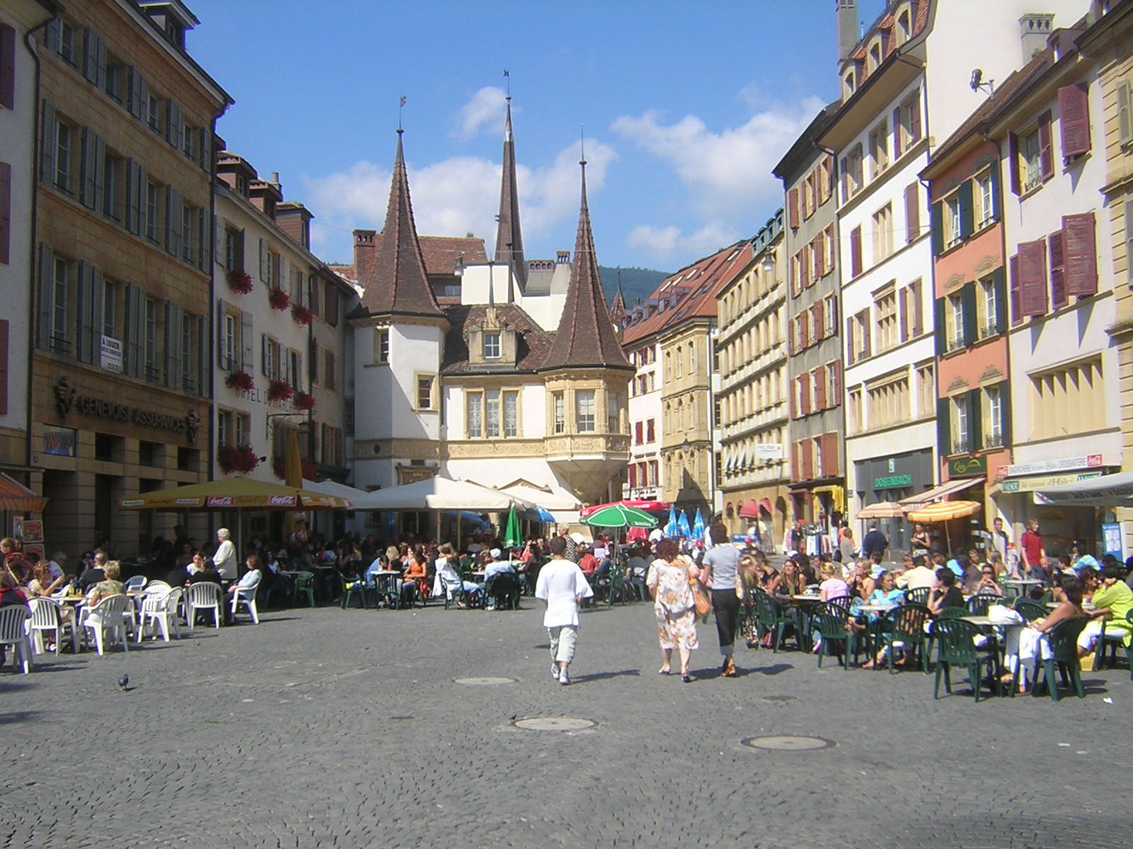 Centre ville de Neuchâtel, ville suisse.